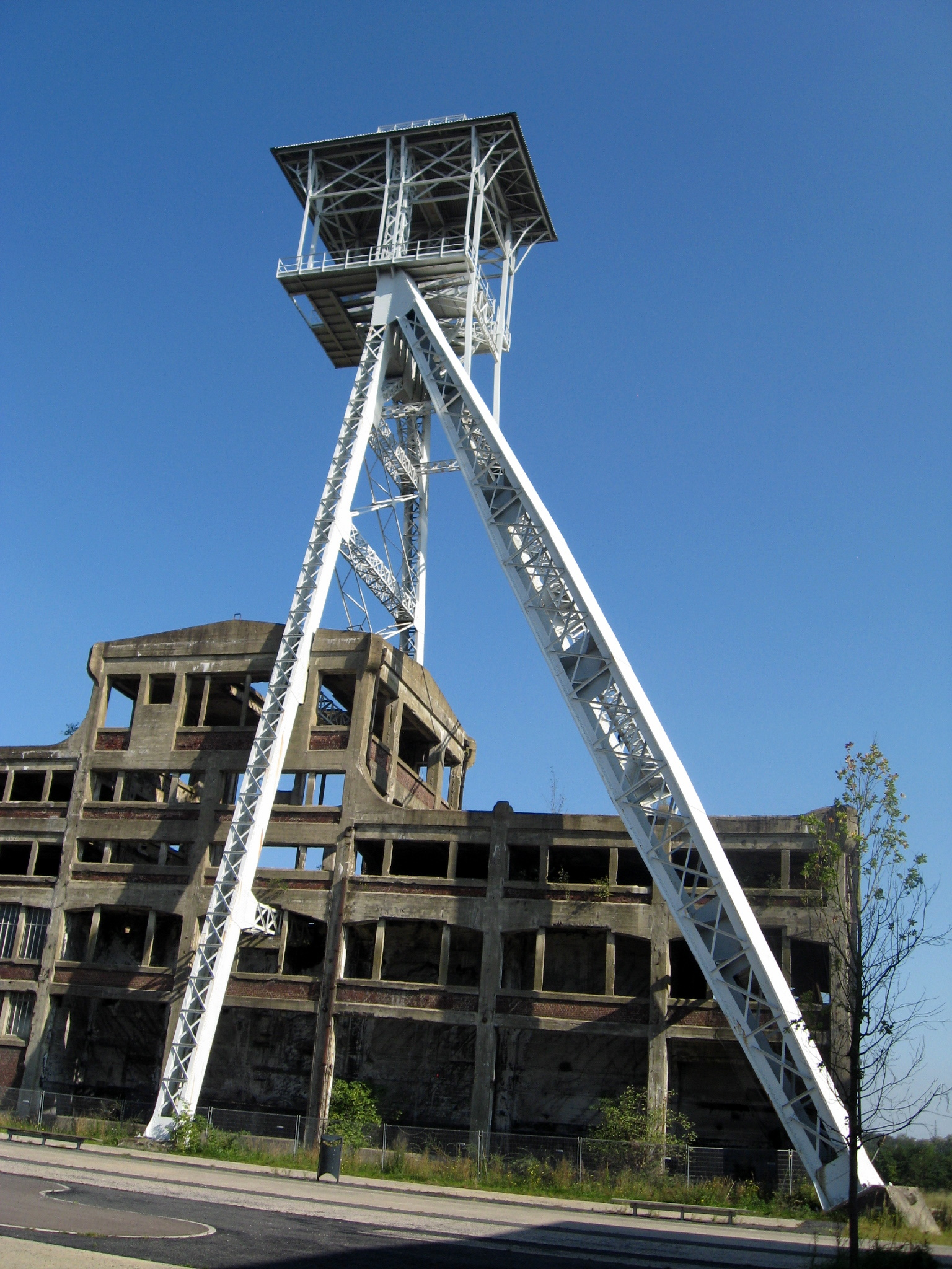 Schacht en schachttoren van Steenkoolmijn Waterschei